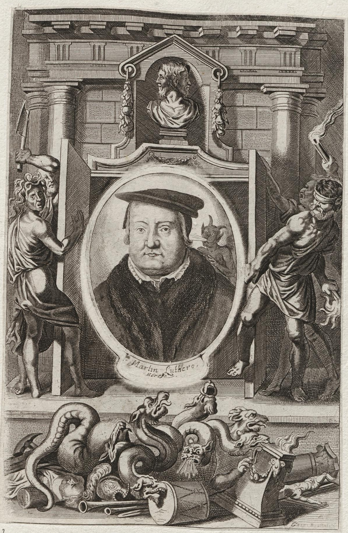 Grafik aus dem Klebeband Nr. 18 der Fürstlich Waldeckschen Hofbibliothek Arolsen Motiv: "Martin Luthero herese"